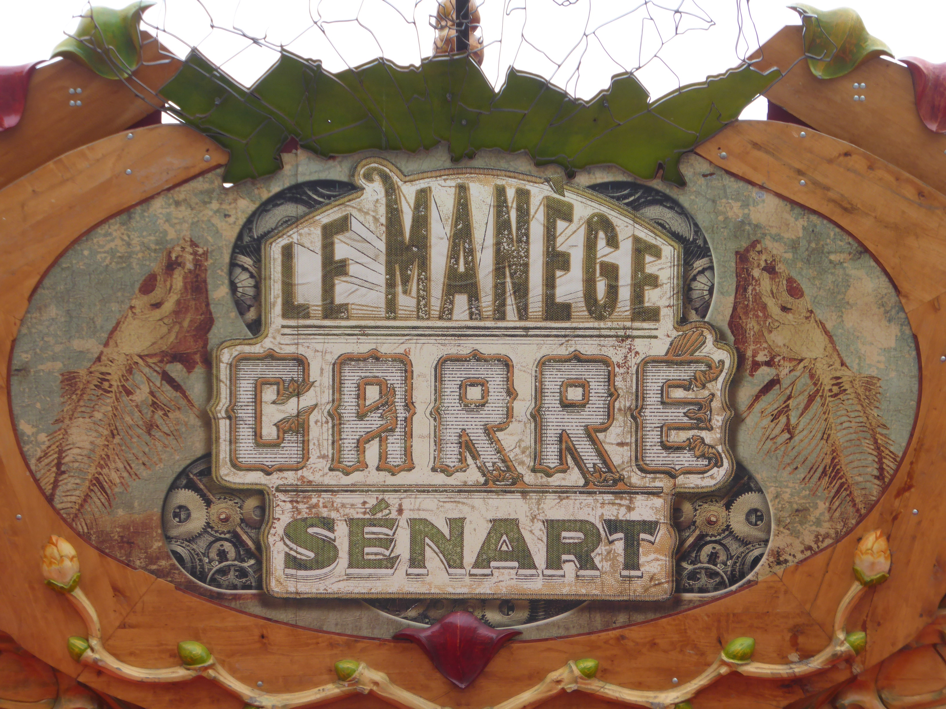 Francouský kolotoč Le Manège Carré Sénart v Plzní.